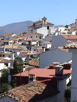 Tejados de Benalauría, Málaga, España.